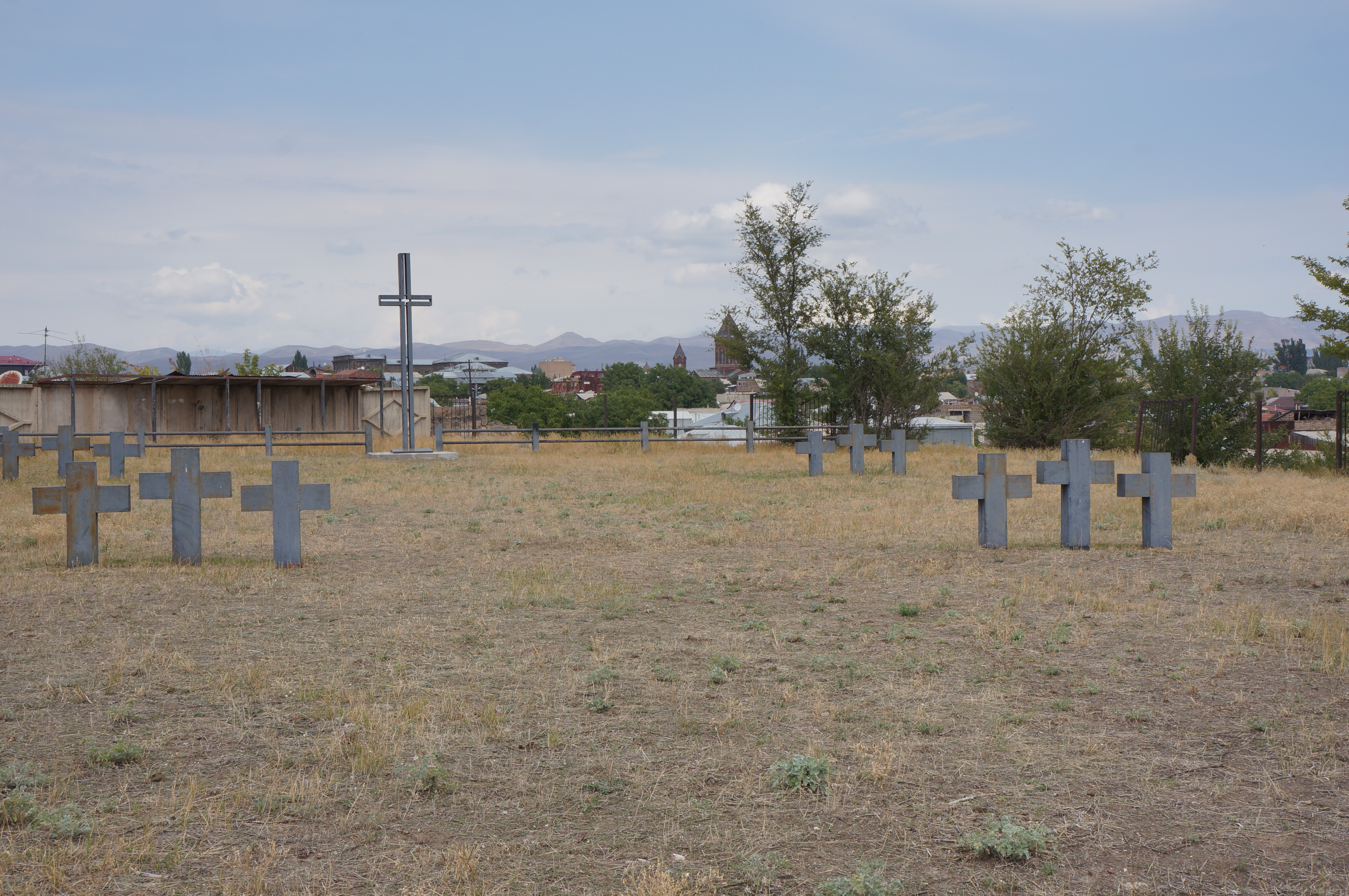 ընդգրկում է քաղաքի պատմական միջուկը 1/4